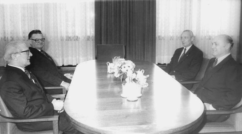 ADN-ZB Mittelstädt-27.12.88-zei-Berlin: Akkreditierung- Der Generalsekretär des ZK der SED und Vorsitzende des Staatsrates der DDR, Erich Honecker, empfing am 19.12. den Außerordentlichen und Bevollmächtigten Botschafter der Vereinigten Staaten von Amerika in der DDr, Richard Clark Barkley (r.), im Anschluß an dessen Akkreditierung zu einem Gespräch. Seitens der DDR nahmen daran der Sekretär des Staatsrates, Heinz Eichler (2.v.l.) und der stellvertrende Außenminister Kurt Nier (2.v.r.) teil.